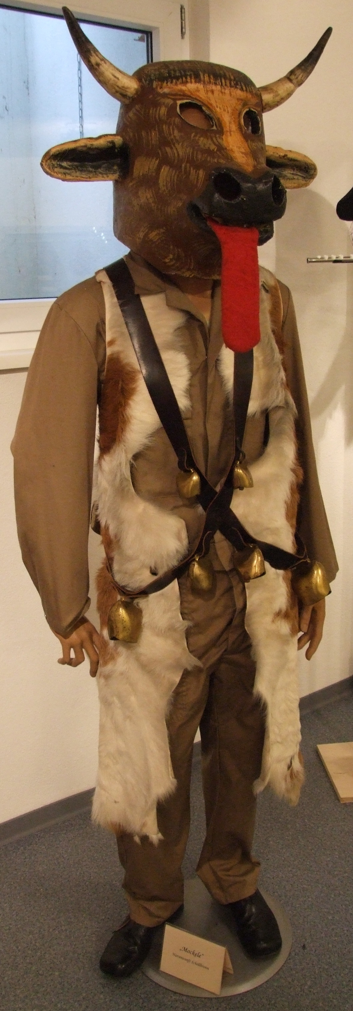 Mockele von der Narrenzunft Schöllbronn, Ettlingen-Schöllbronn, aufgenommen bei der Jubiläumsausstellung des Fasnachtsmuseums Speyer